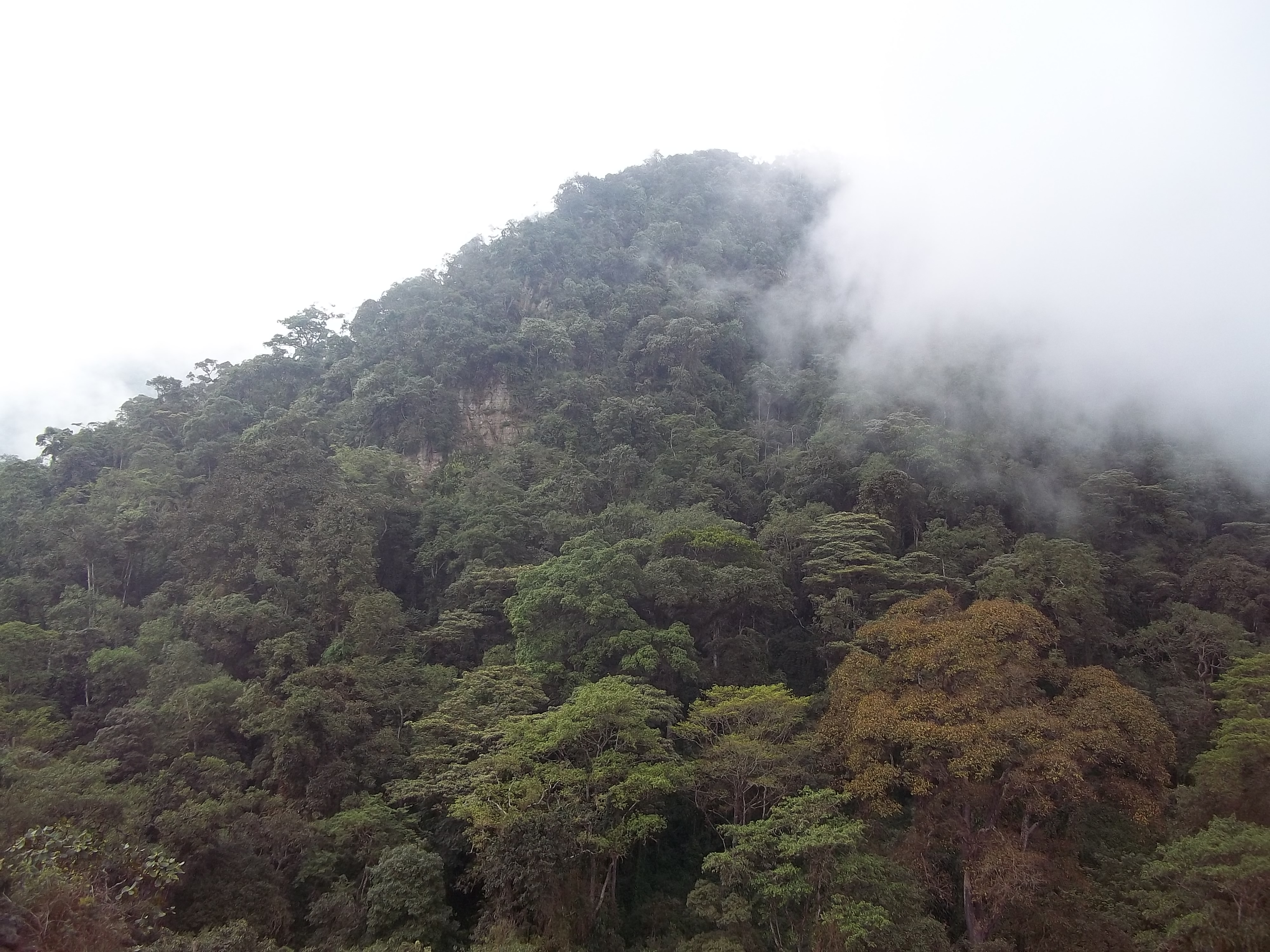 A cualquier hora del día la niebla puede regalarnos el hermoso espectáculo de cubrirlo todo